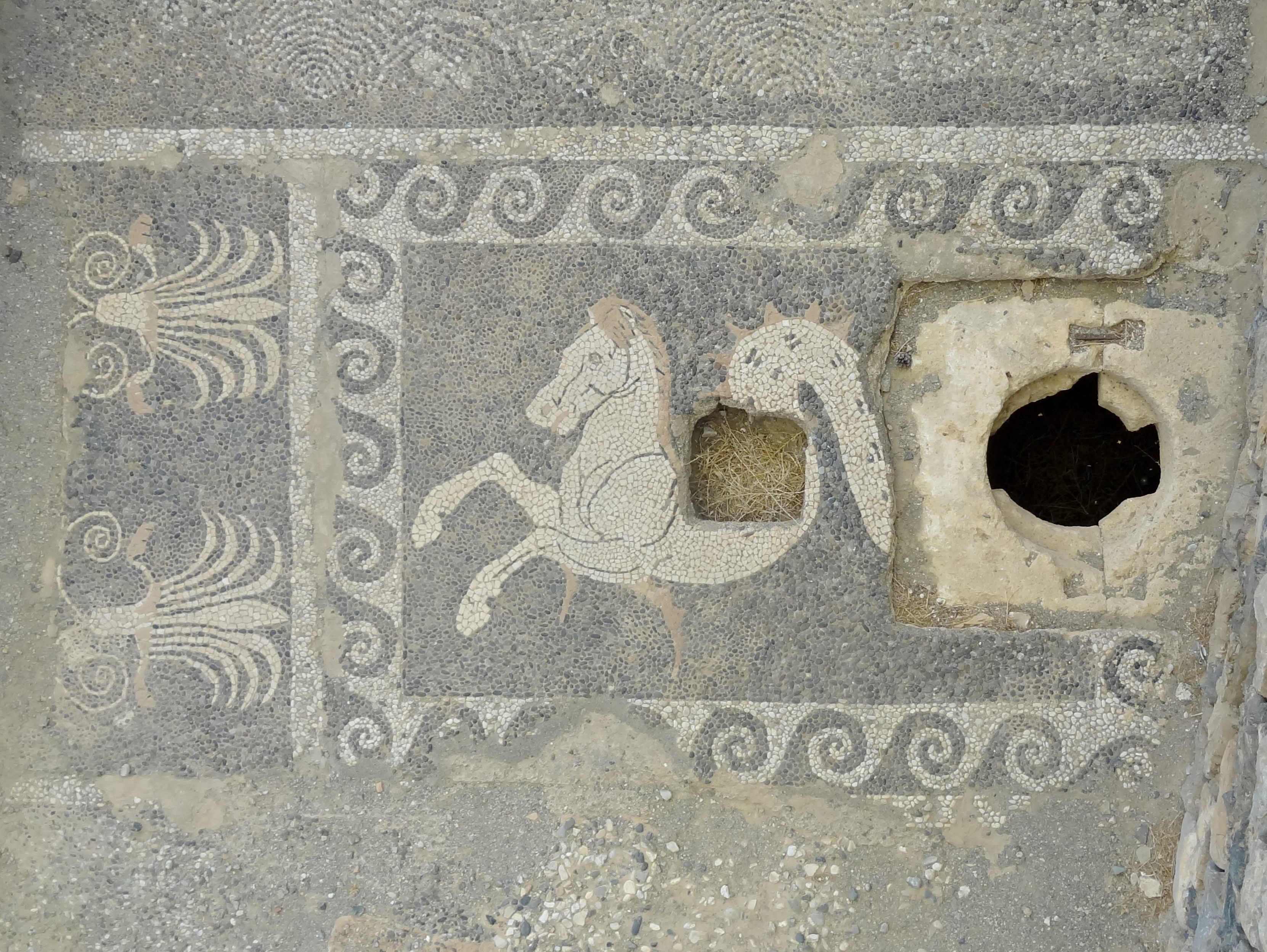 Asklepios-Heiligtum des antiken Leben (Λεβήν) in Lendas, Gemeinde Gortyna, Regionalbezirk Iraklio, Kreta, Griechenland